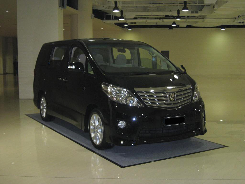 2010 Toyota Alphard 2.4 (ANH20).